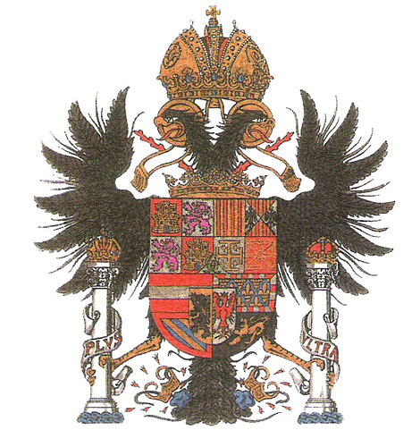 Escudo Imperial Orden Hispánica de Carlos V